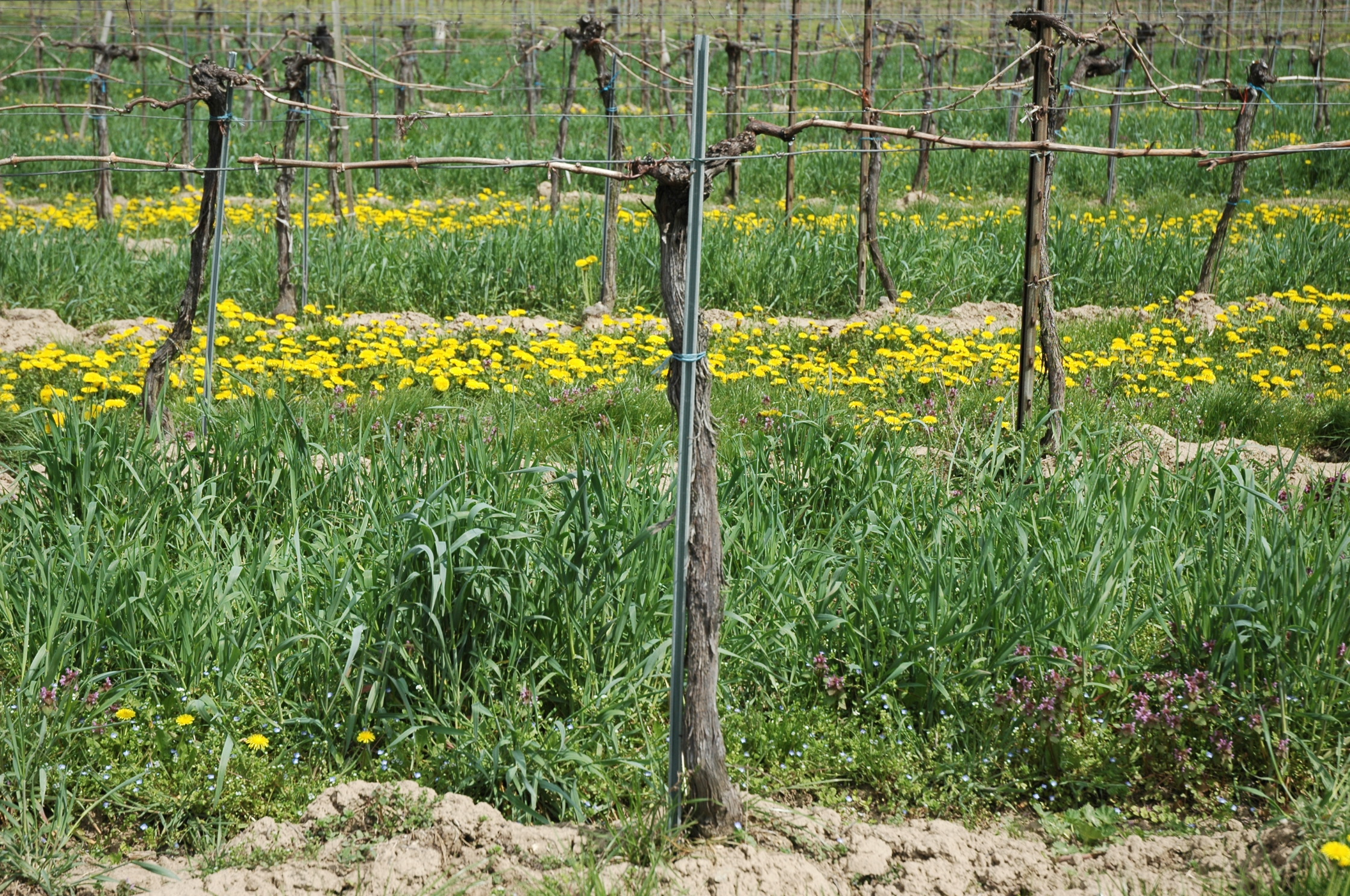 Hochkultur mit Zweistreckerschnitt (Flachbogen)